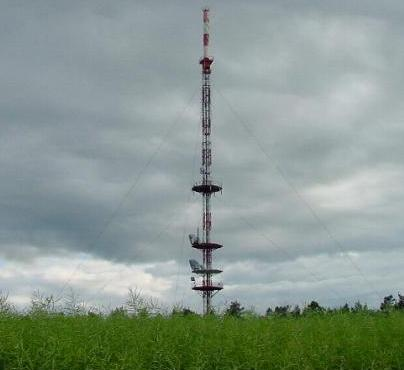 Sender Senningshöhe